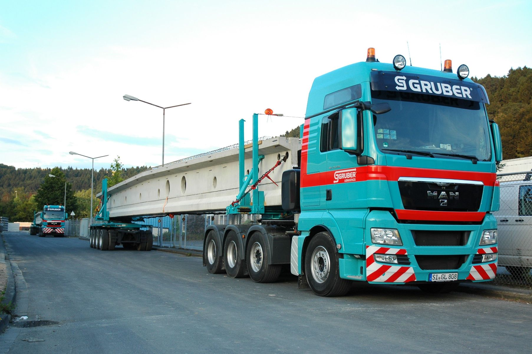 verlängerbarer Nachläufer, Schwertransport, Spezialtransport